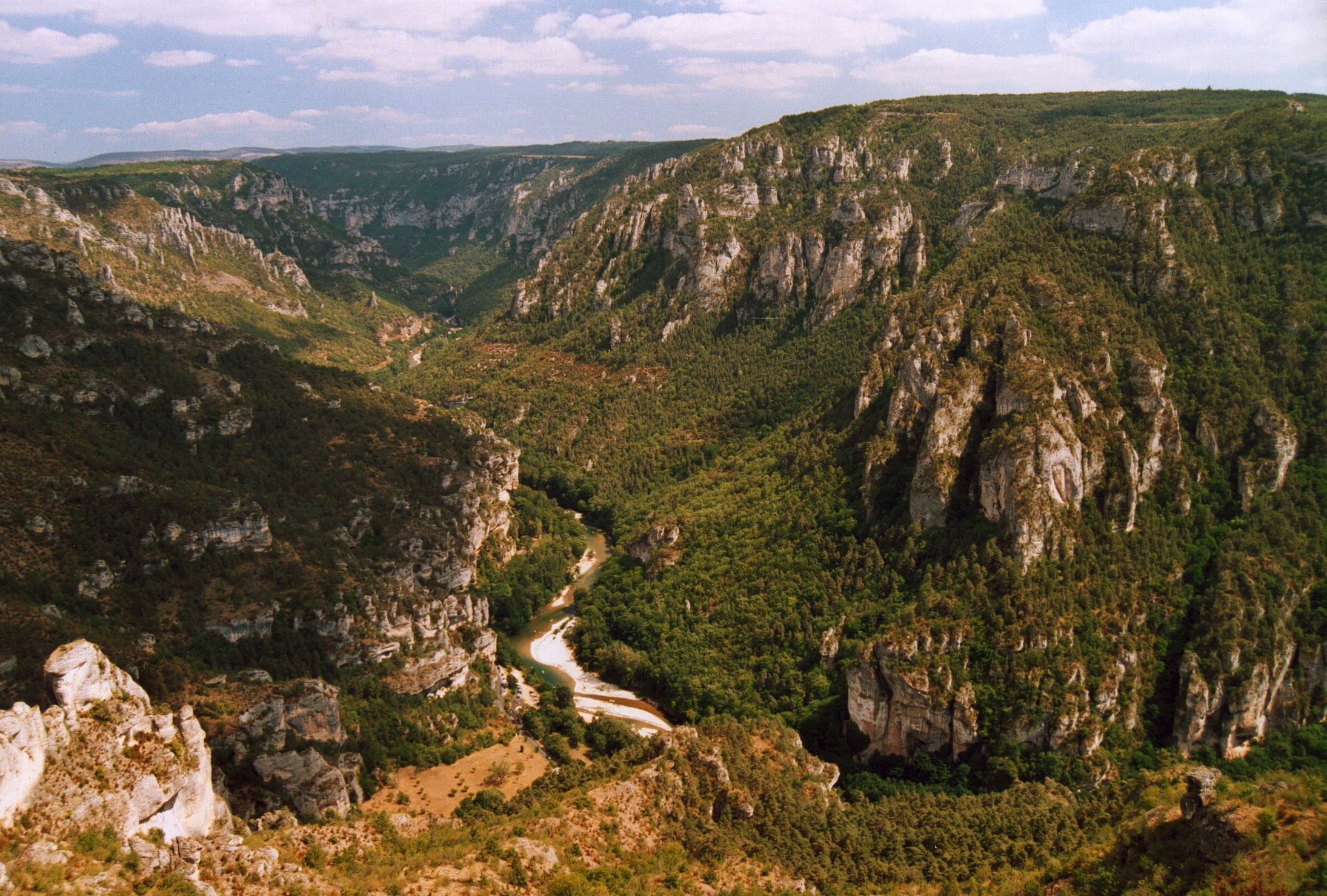 France, Lozere, Gorges du Tarn, Point sublime Photographie prise par GIRAUD Patrick Août 2005